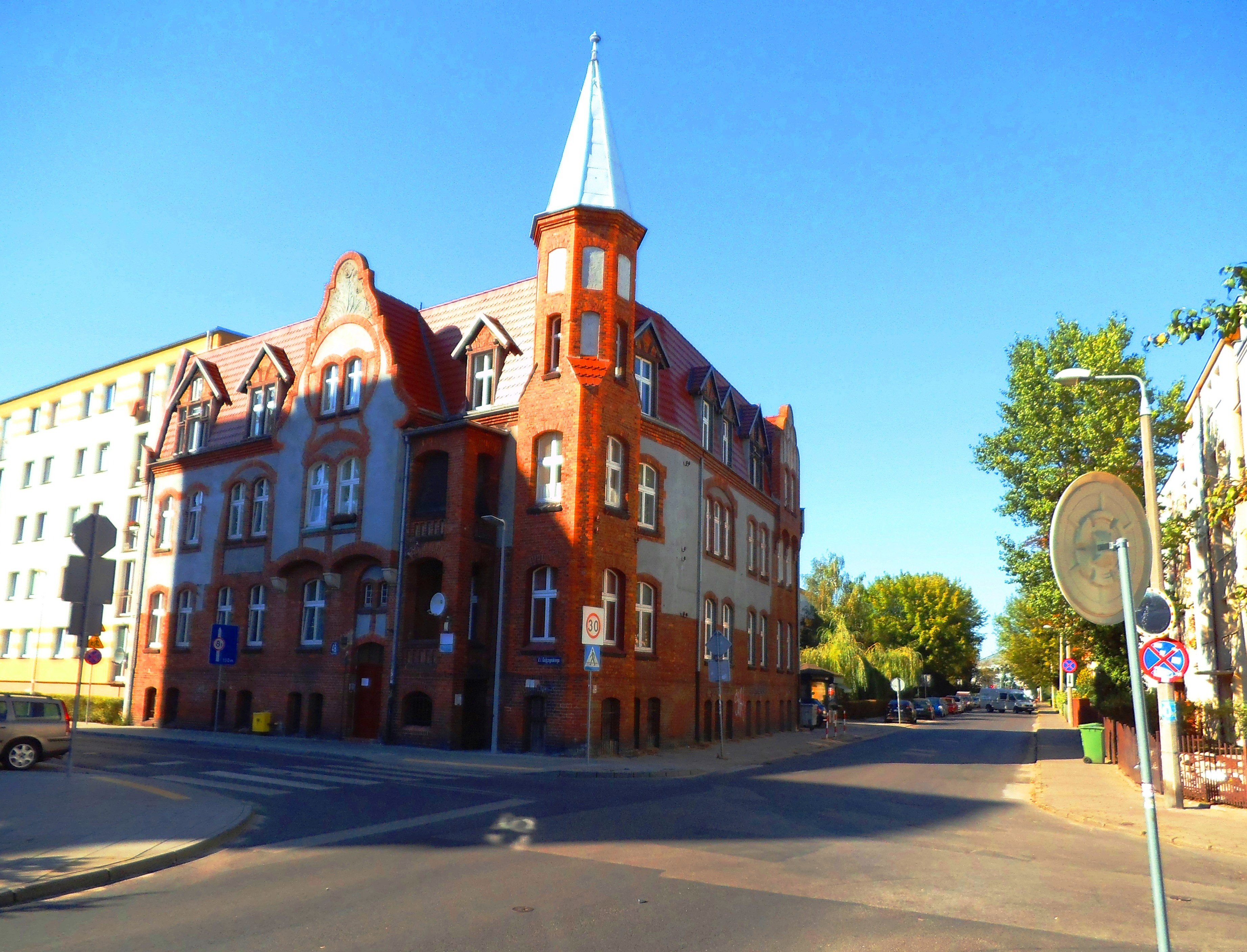 Ulica Matejki w Toruniu